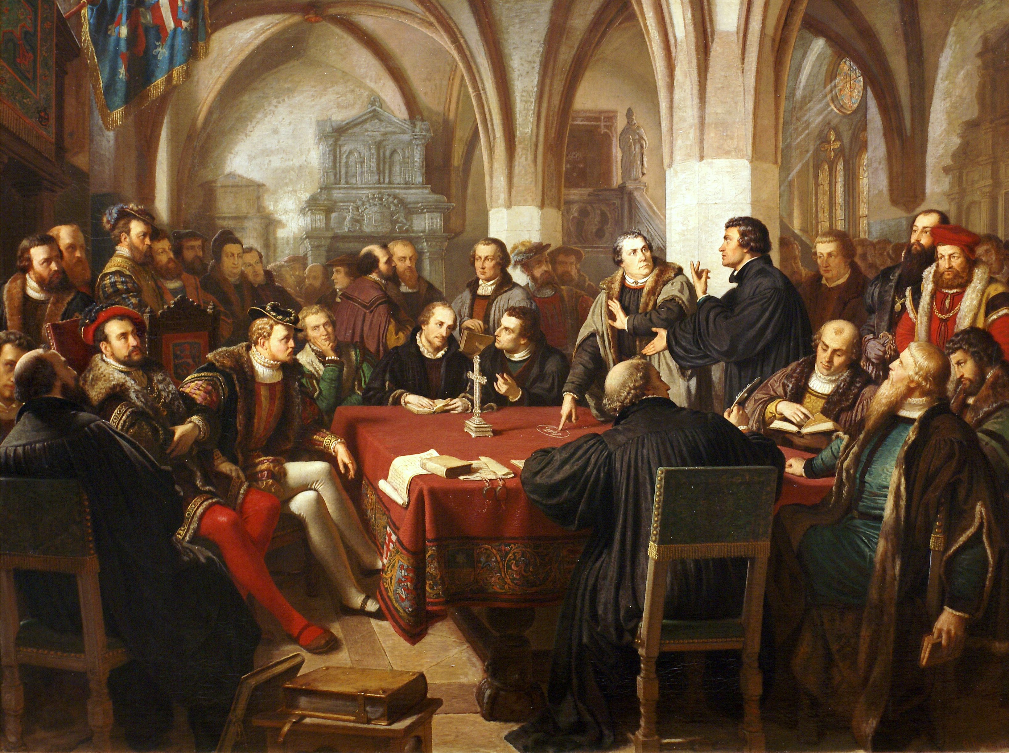 Das 1867 entstandene Gemälde "Religionsgespräch zu Marburg" zeigt den Disput Martin Luthers mit dem Schweizer Reformator Ulrich Zwingli im Jahr 1529 in Marburg über das Verständnis des Abendmahls. Zu diesem Streitgespräch eingeladen hatte Landgraf Philipp der Großmütige, der auf dem Schloss in Marburg residierte und die Reformation in Hessen eingeführt hatte. Er sitzt links am Tischrand, neben ihm Herzog Ulrich von Württemberg.